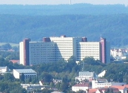 Augsburg_Zentralklinikum